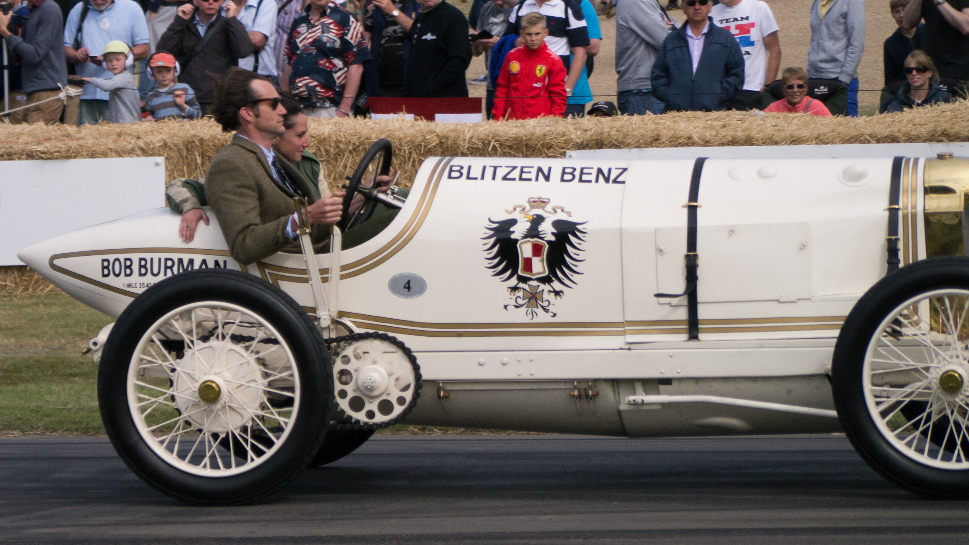 21.5 litre 4-cylinder